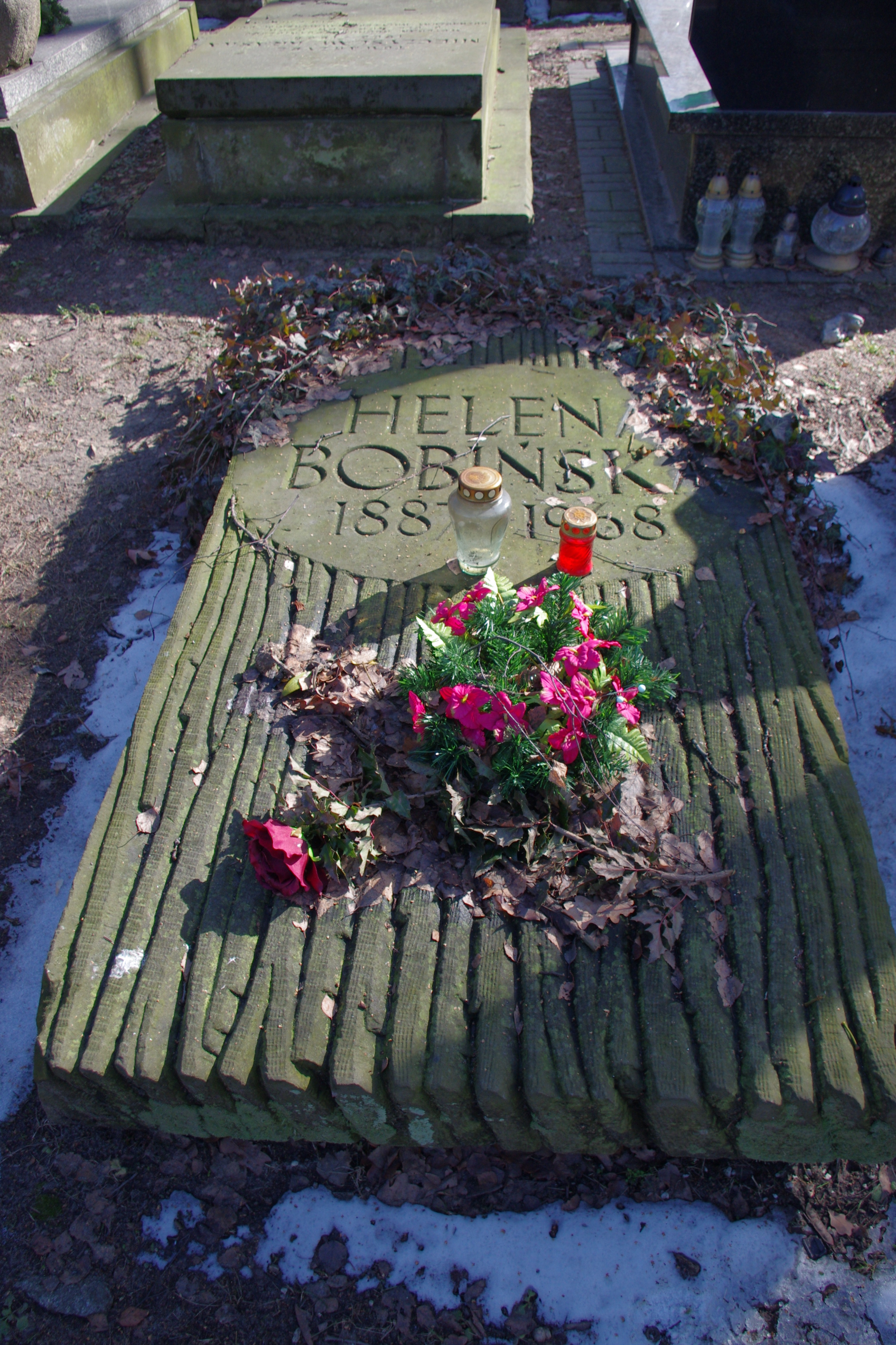 Grób pisarki Heleny Bobińskiej na Wojskowych Powązkach w Warszawie